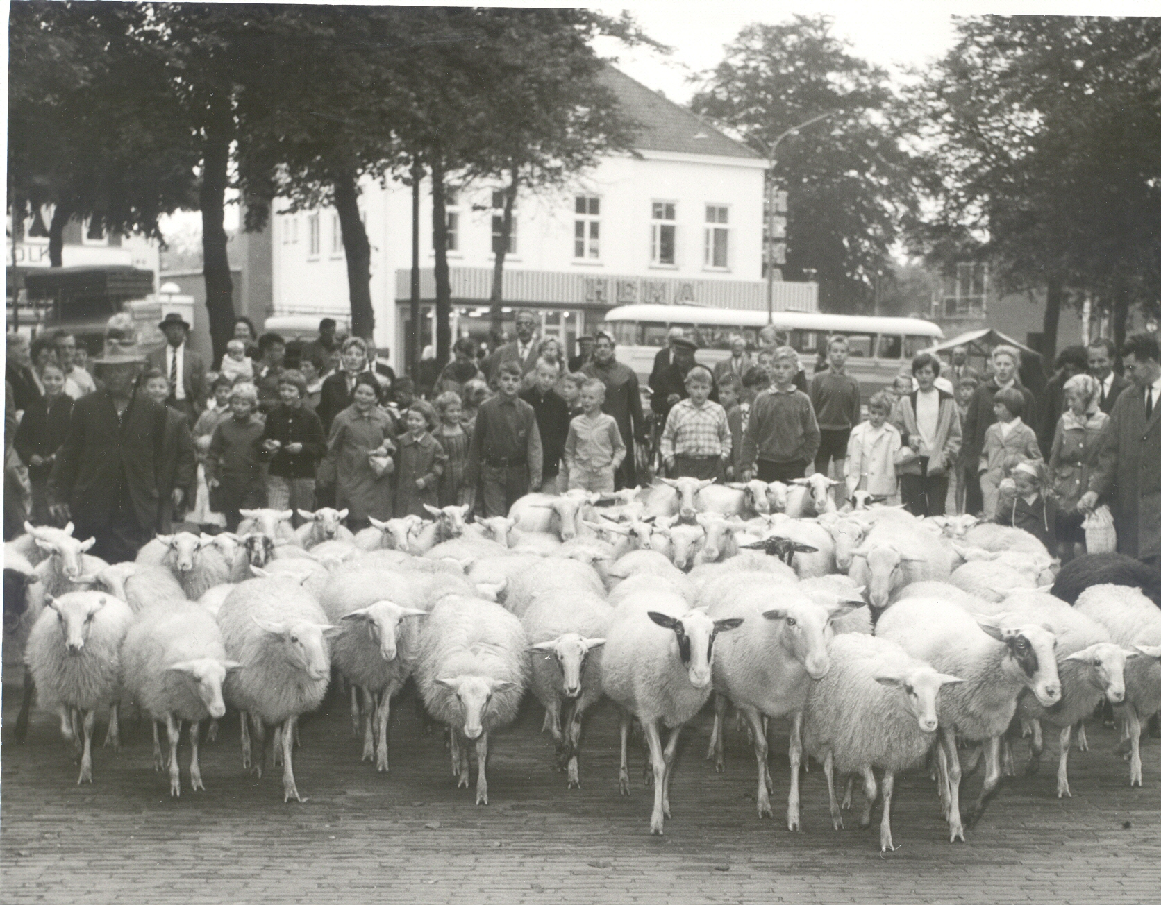 De schaapskudde op de Markt in Ede. Op de achtergrond de Hema.